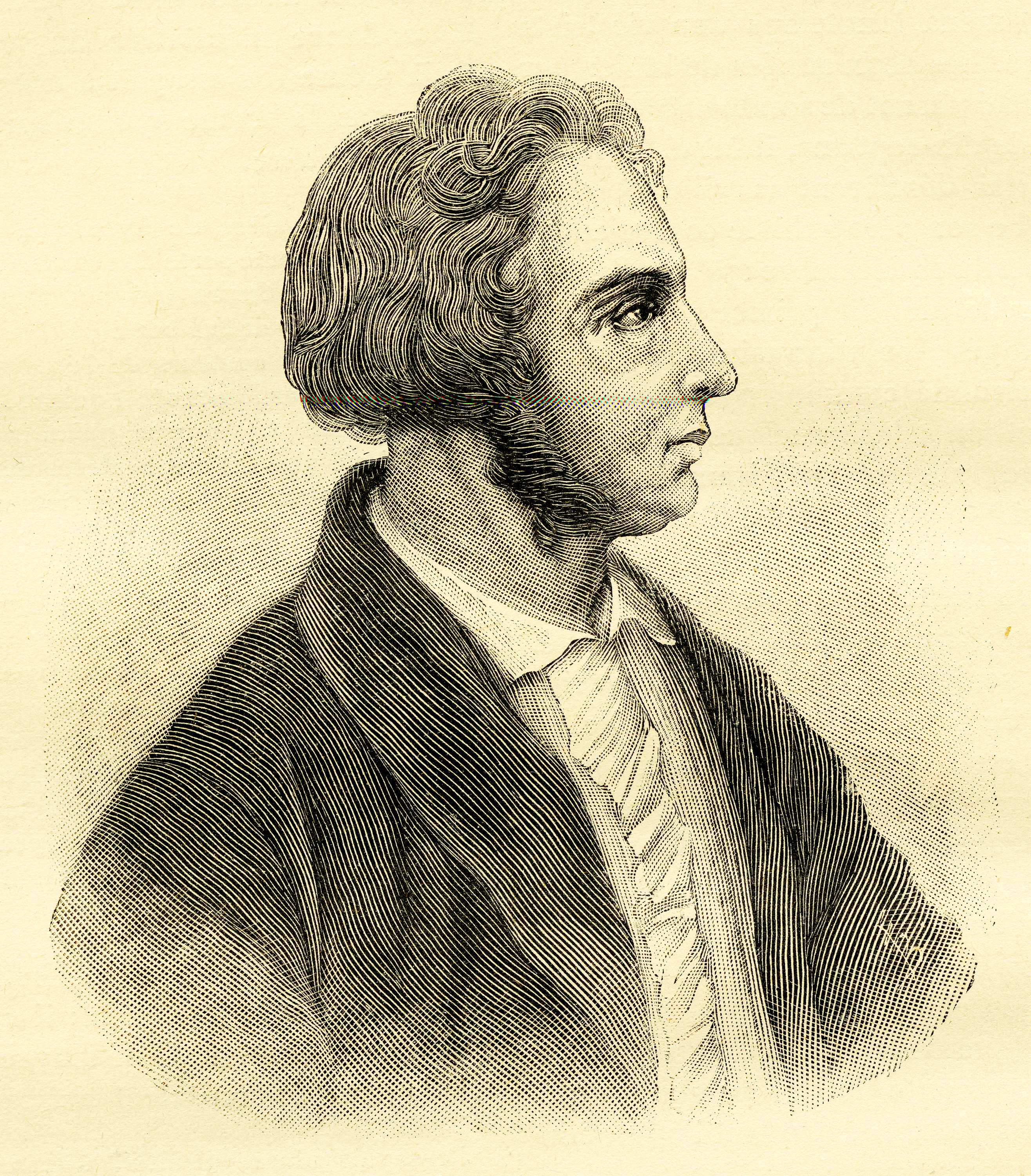 Gravure